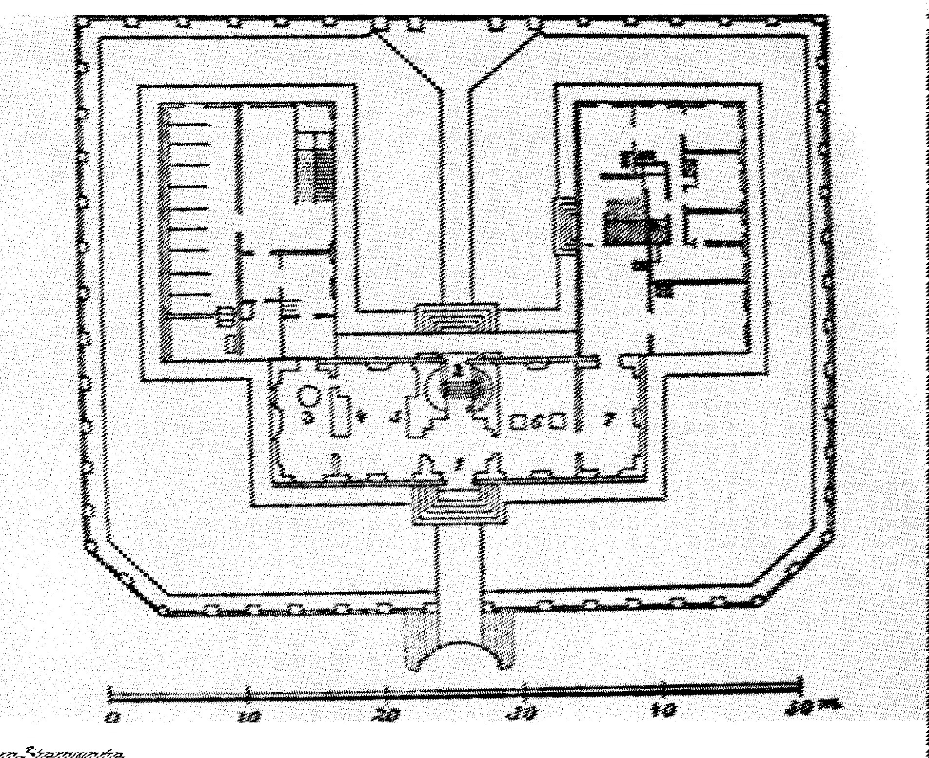 ´Grundriss 88.134.58.25 17:15, 2. Mär 2006 (CET) der Seebergsternwarte aus Catalogus novus von 1792